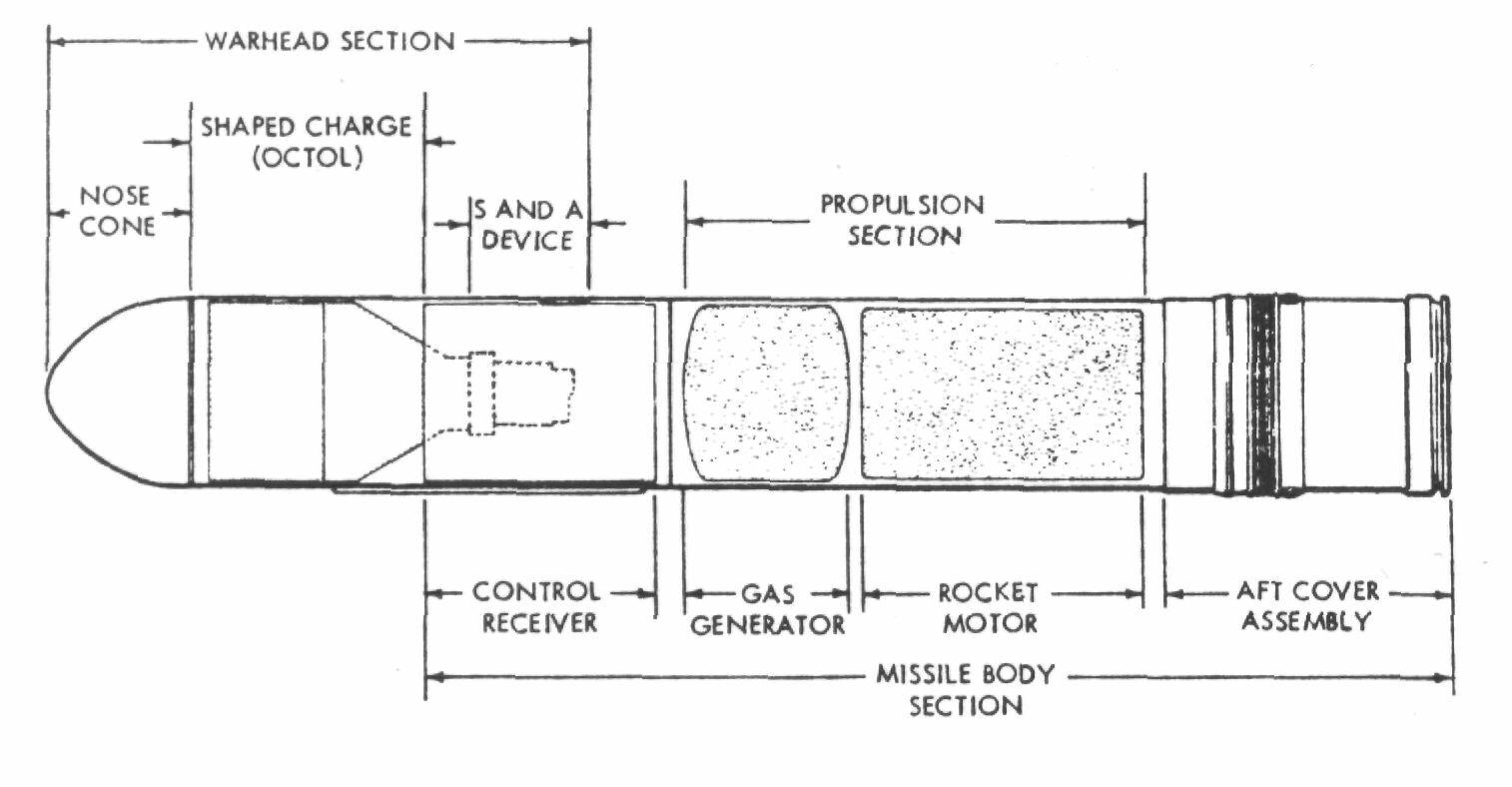 Shillelagh rocket.